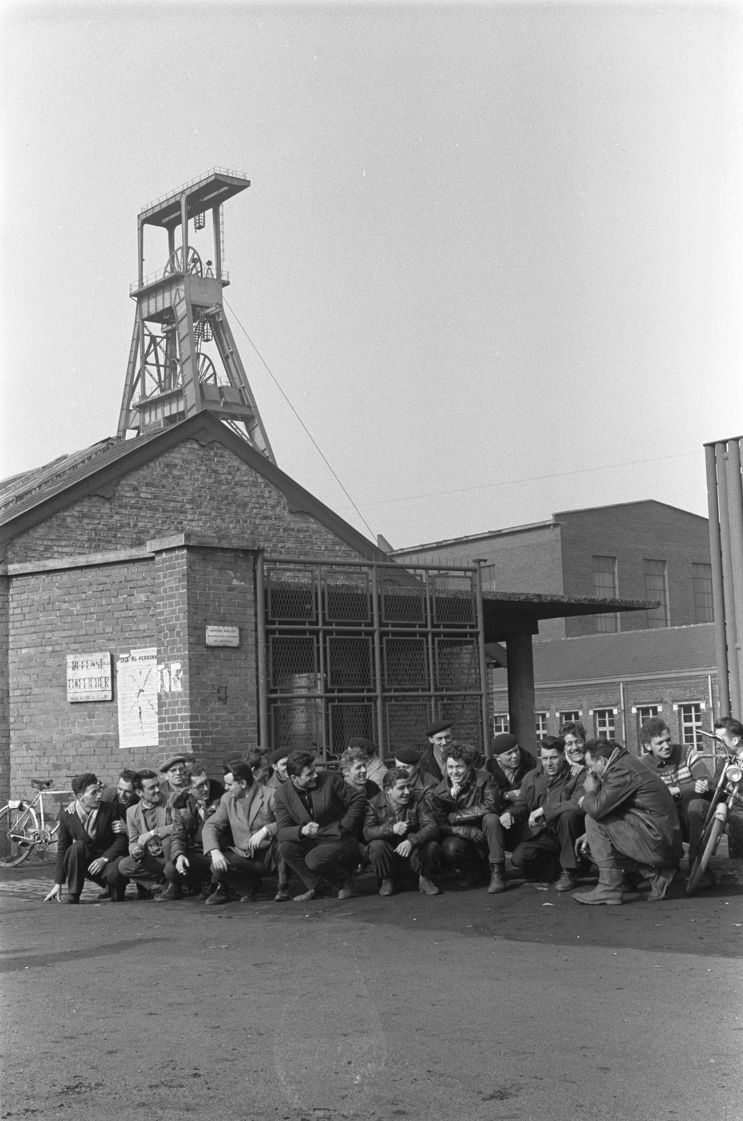 Collectie / Archief : Fotocollectie Anefo Reportage / Serie : [ onbekend ] Beschrijving : Mijnwerkersstaking in Frankrijk, mijnwerkers zittend voor de ingang van de mijn in Conde Datum : 5 maart 1963 Locatie : Frankrijk Trefwoorden : Mijnwerkers, stakingen Fotograaf : Pot, Harry / Anefo Auteursrechthebbende : Nationaal Archief Materiaalsoort : Negatief (zwart/wit) Nummer archiefinventaris : bekijk toegang 2.24.01.05 Bestanddeelnummer : 914-8960